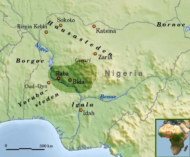 Historisch Nupe in Nigeria, Nederlands